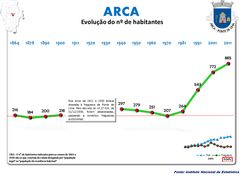 Censos 1864/2011